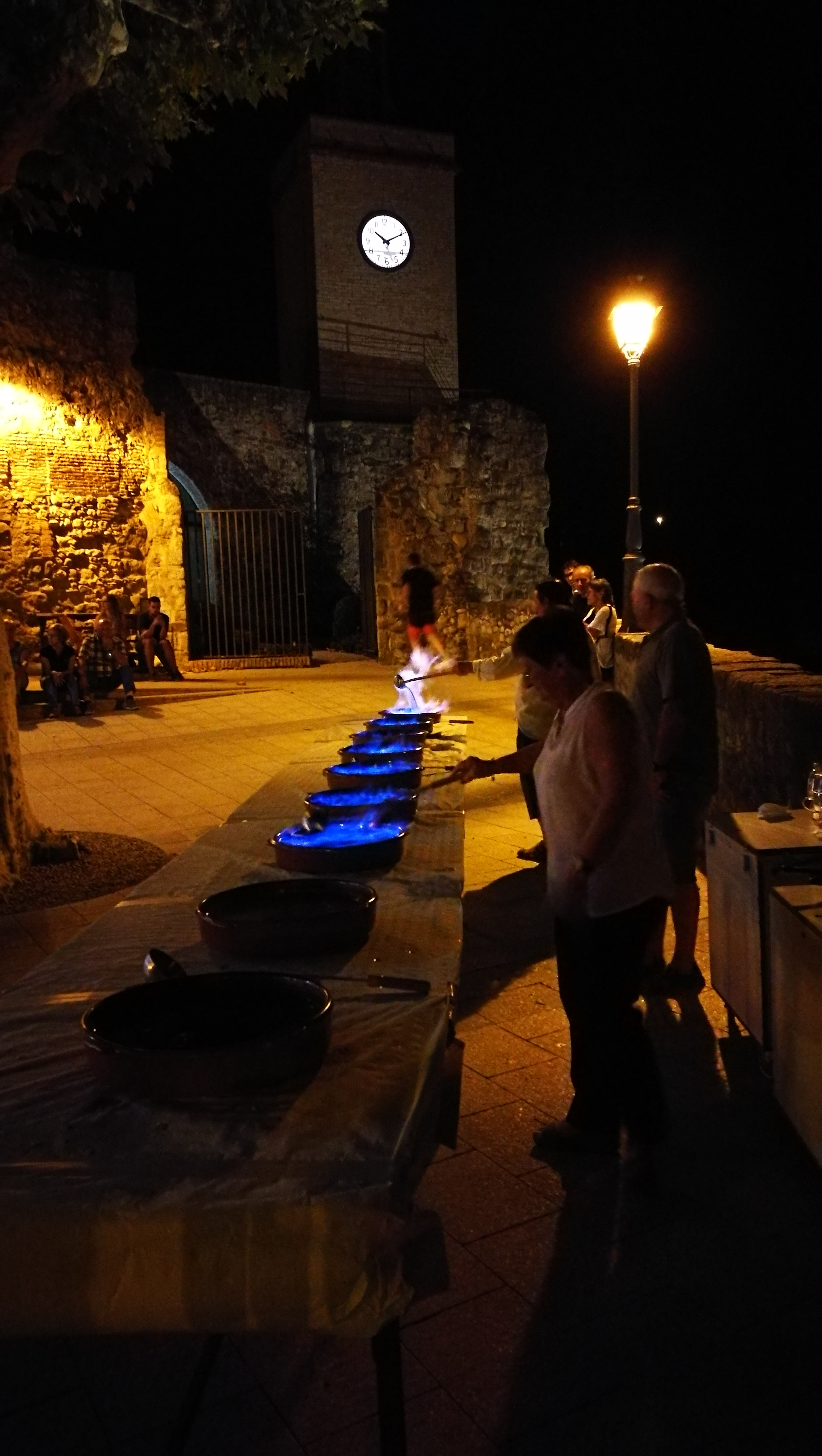 cremant el ron a la Festa Major de Gironella 2017